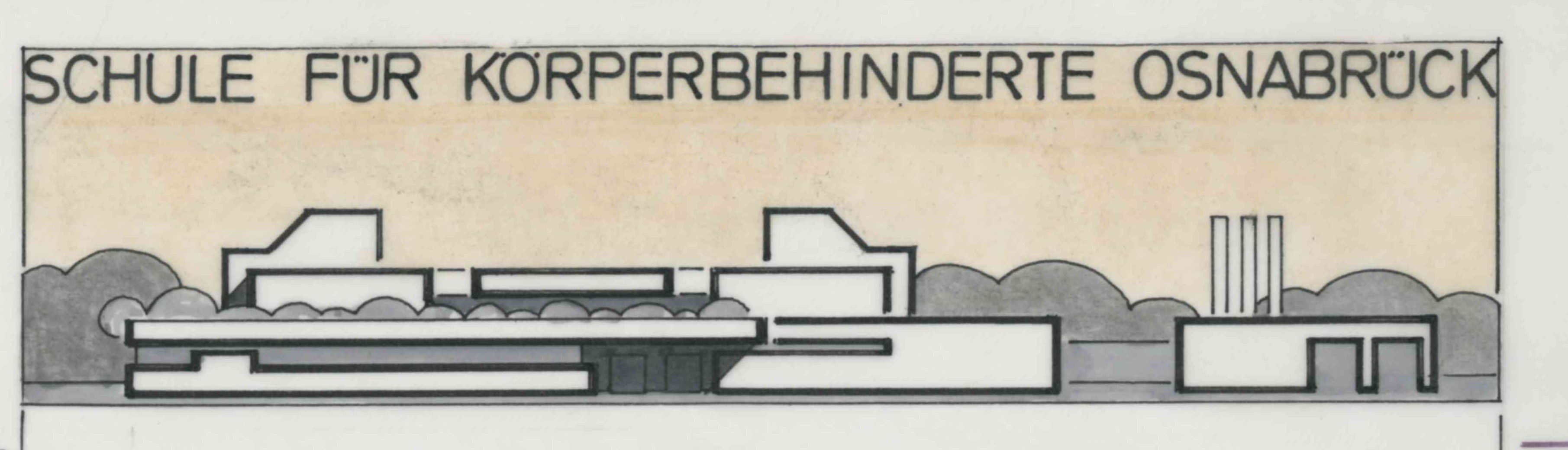 Ansicht